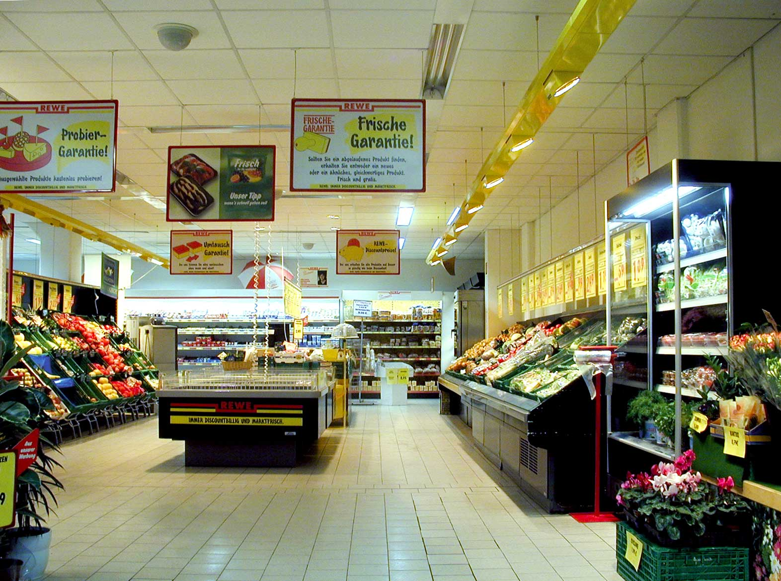 REWE-Supermarkt in Eberswalde, Innenaufnahme - die Geschäftsleitung hat die Aufnahme genehmigt